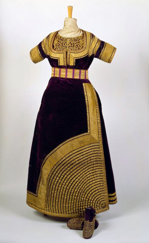 Grande tenue de cérémonie, keswa el kbira . Dans tout le Maroc espagnol, les juives citadines portaient le jour de leur noce cette riche tenue composée d’une jupe, jeltita, d’un boléro, gombaz, sous lequel était ajusté un plastron, ktef, et auquel on rapportait des manches de tulle brodé. L’ensemble est complété par une ceinture tissée en brocart de soie. Ici les chaussures ont été assorties à la tenue et à la coiffe.